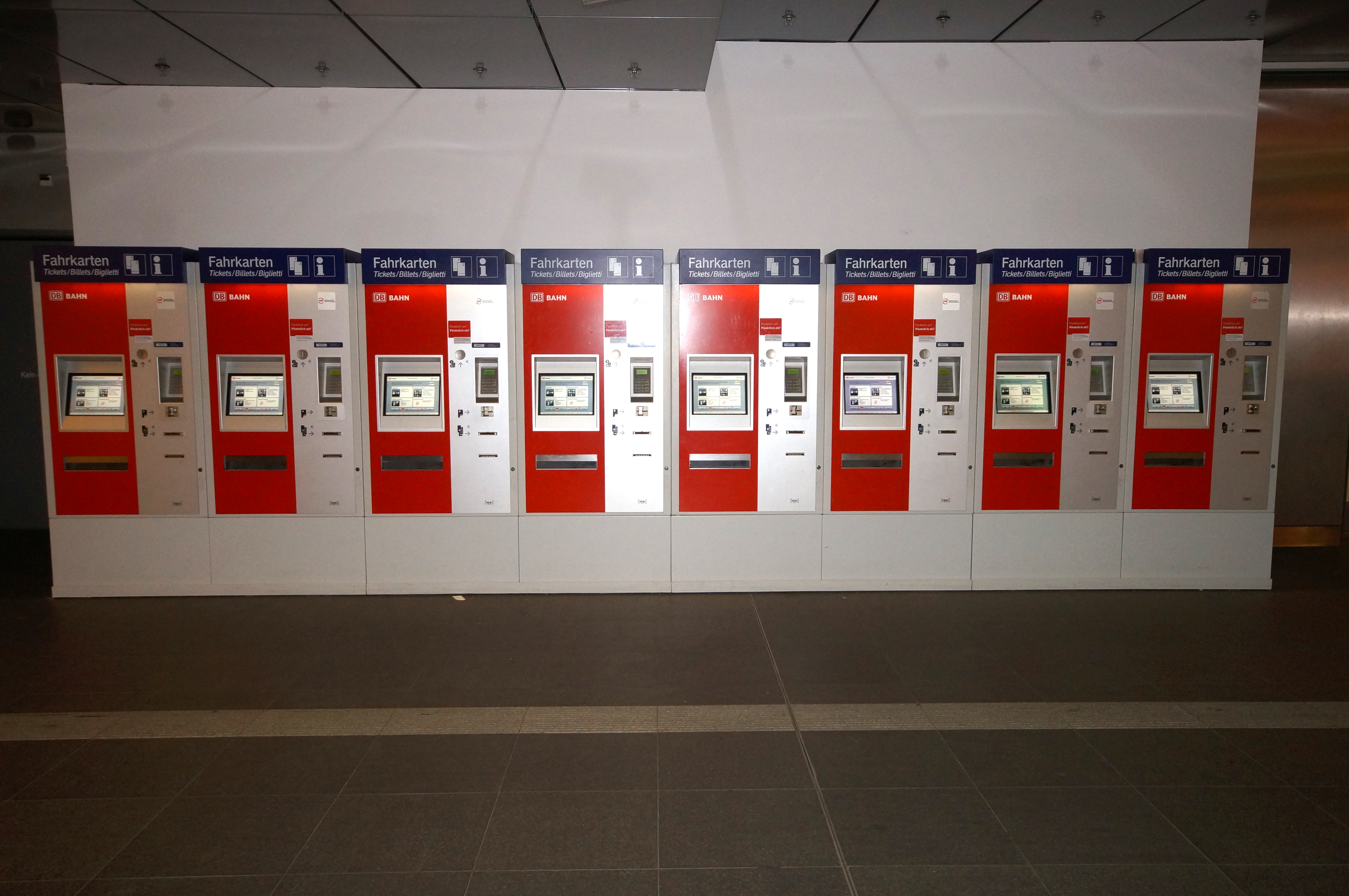 Fahrkartenautomaten der Deutschen Bahn im Berliner Hauptbahnhof